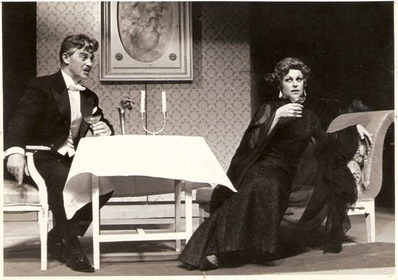 נתן כוגן ואורנה פורת